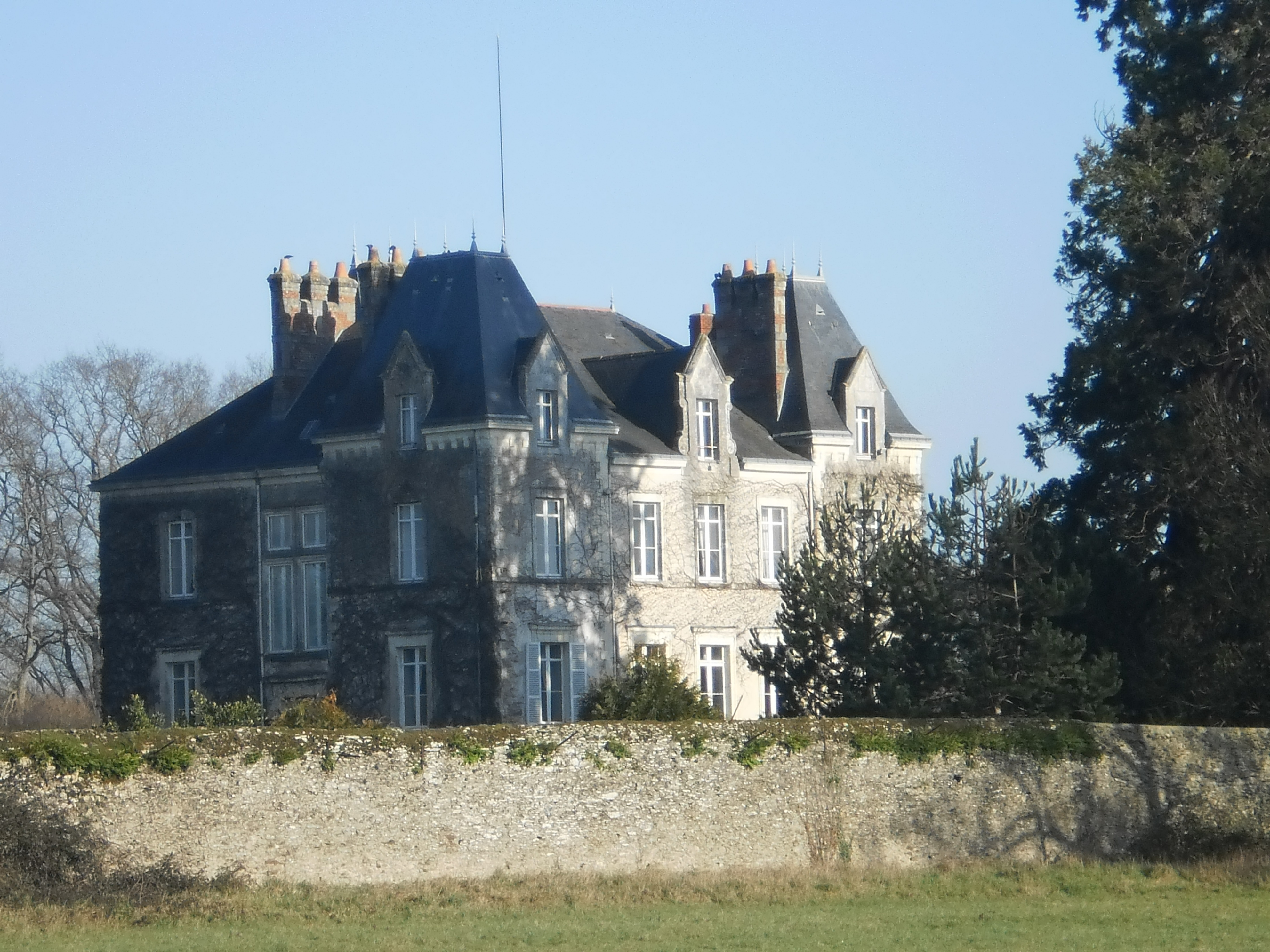 Manoir du Grand-Plessis - Sainte-Luce-sur-Loire (Loire-Atlantique, France). Un château existe sur ce site dès 1471. Le manoir actuel a été construit entre 1874 et 1876.